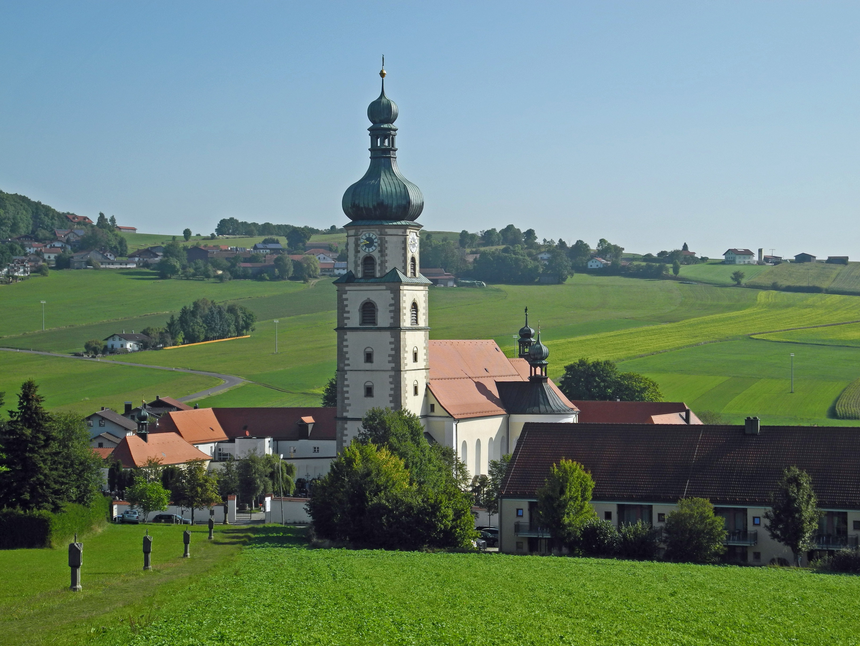 Blick von der Annenkapelle auf die katholische Wallfahrts- und Pfarrkirche Mariä Geburt in Neukirchen beim Heiligen Blut in der OberpfalzThis is a photograph of an architectural monument.